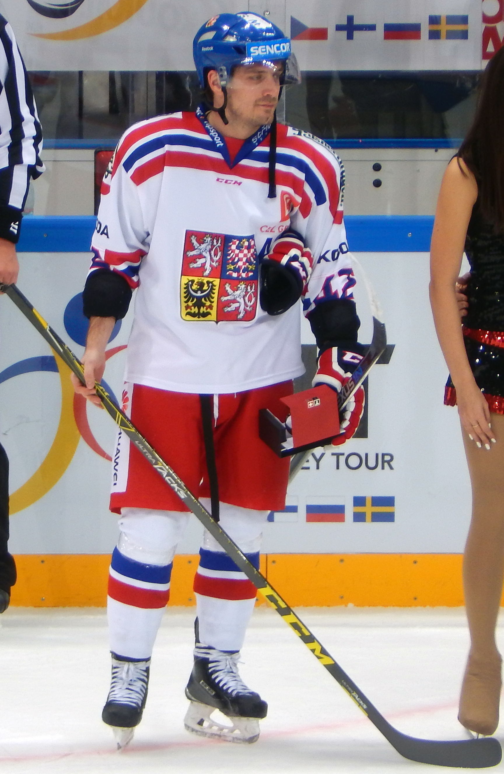 Петр Коукал на Кубке Первого Канала 2015 против Швеции